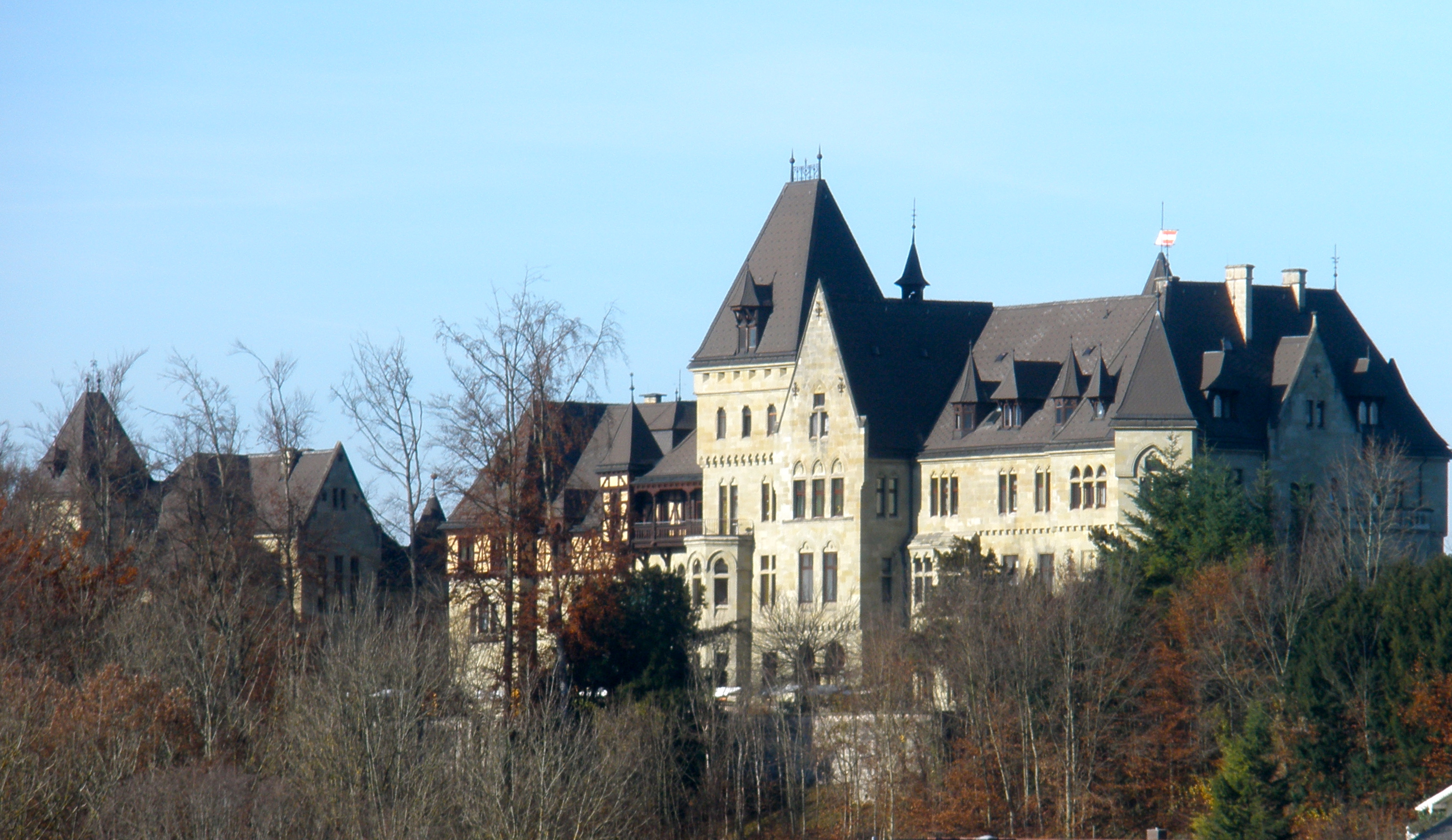 Landespflegeanstalt Schloß Cumberland